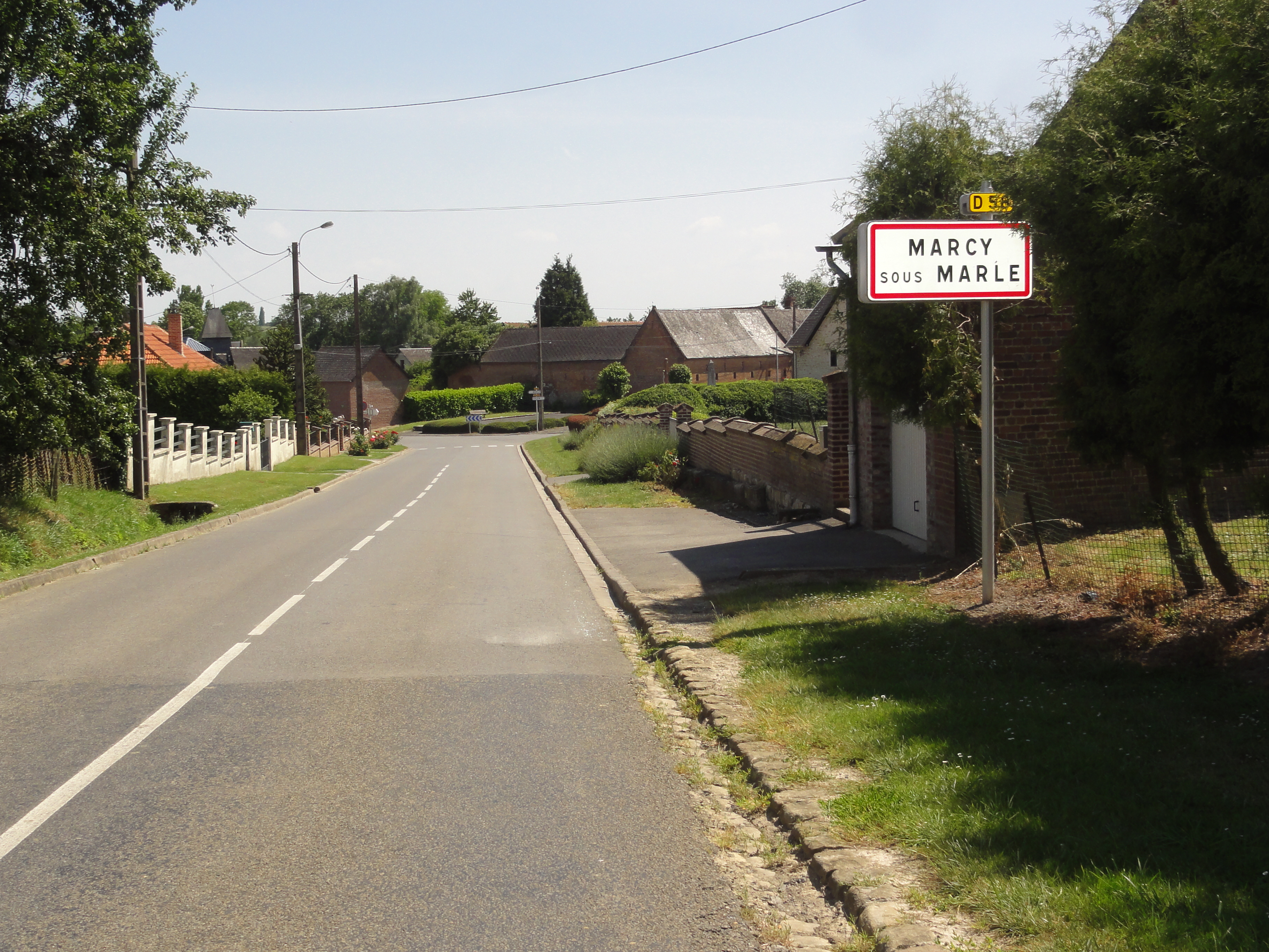 Marcy-sous-Marle (Aisne) city limit sign